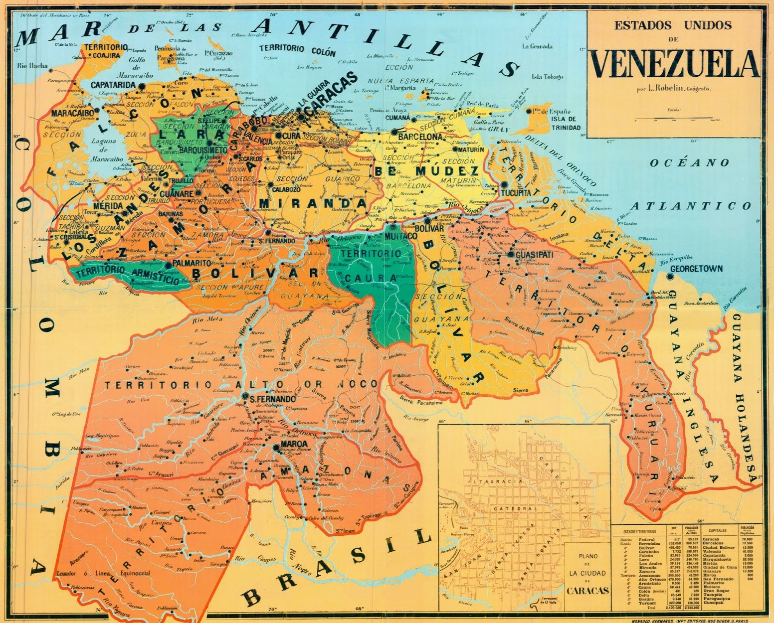 Mapa de los Estados Unidos de Venezuela elaborado por L. Robelin, cerca de 1890.